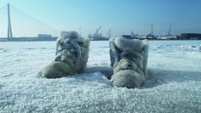 Video art